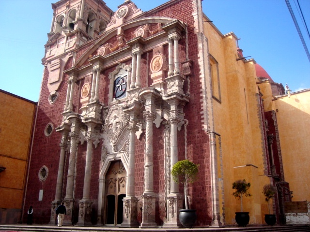 catedral de queretaro